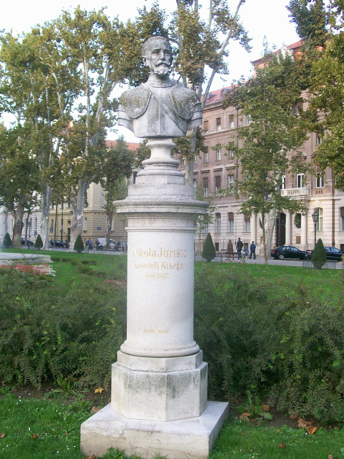 Spomenik Nikoli Jurišiću, Zagreb, Zrinjevac